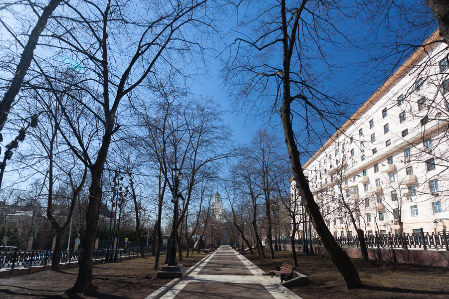 Яузский бульвар, вид на юго-запад в сторону набережных. Справа - Голосовский дом (Дом со скульптурами), слева - городская усадьба Спиридова-Рюхардт.